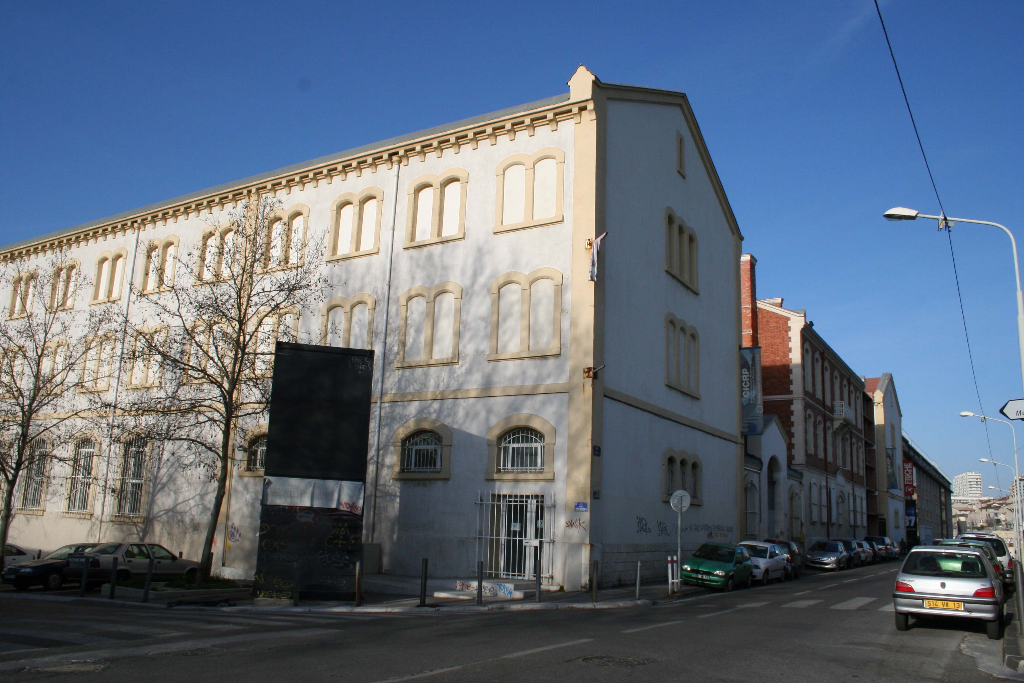 Ancienne manufacture des tabacs à Marseille, siège actuel des archives municipales.